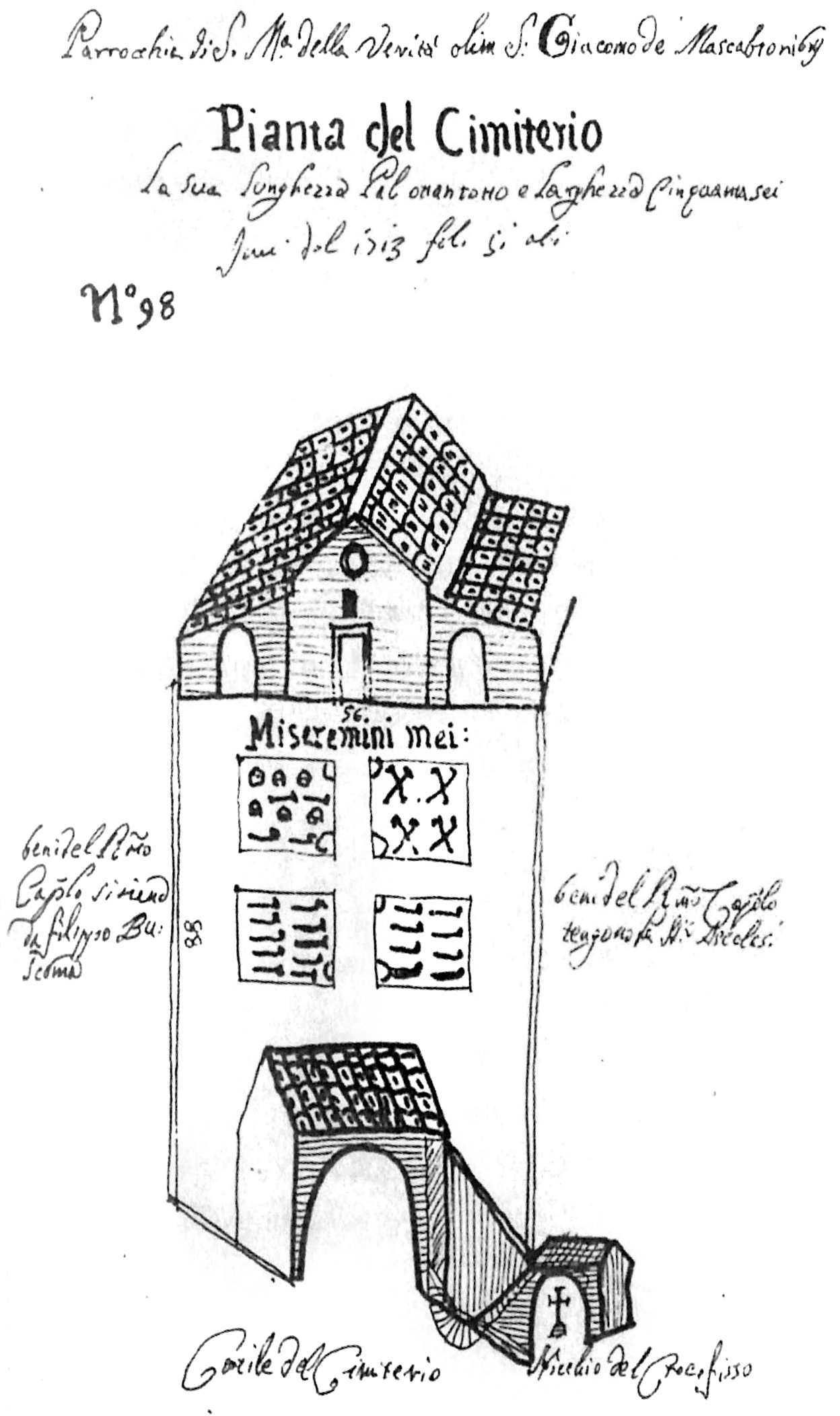 Il cimitero dei Morticelli come appariva nel 1712, in uno schizzo di Carlo Pedicini per il Capitolo Metropolitano di Benevento